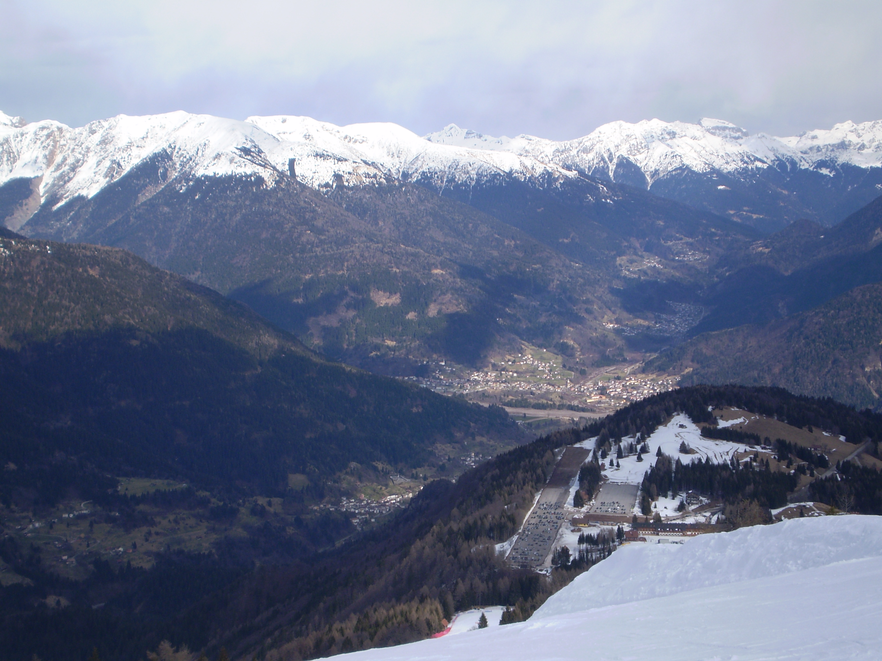 Paluzza e la Val Pontaiba coi paesi di Treppo Carnico e Ligosullo visti dallo Zoncolan